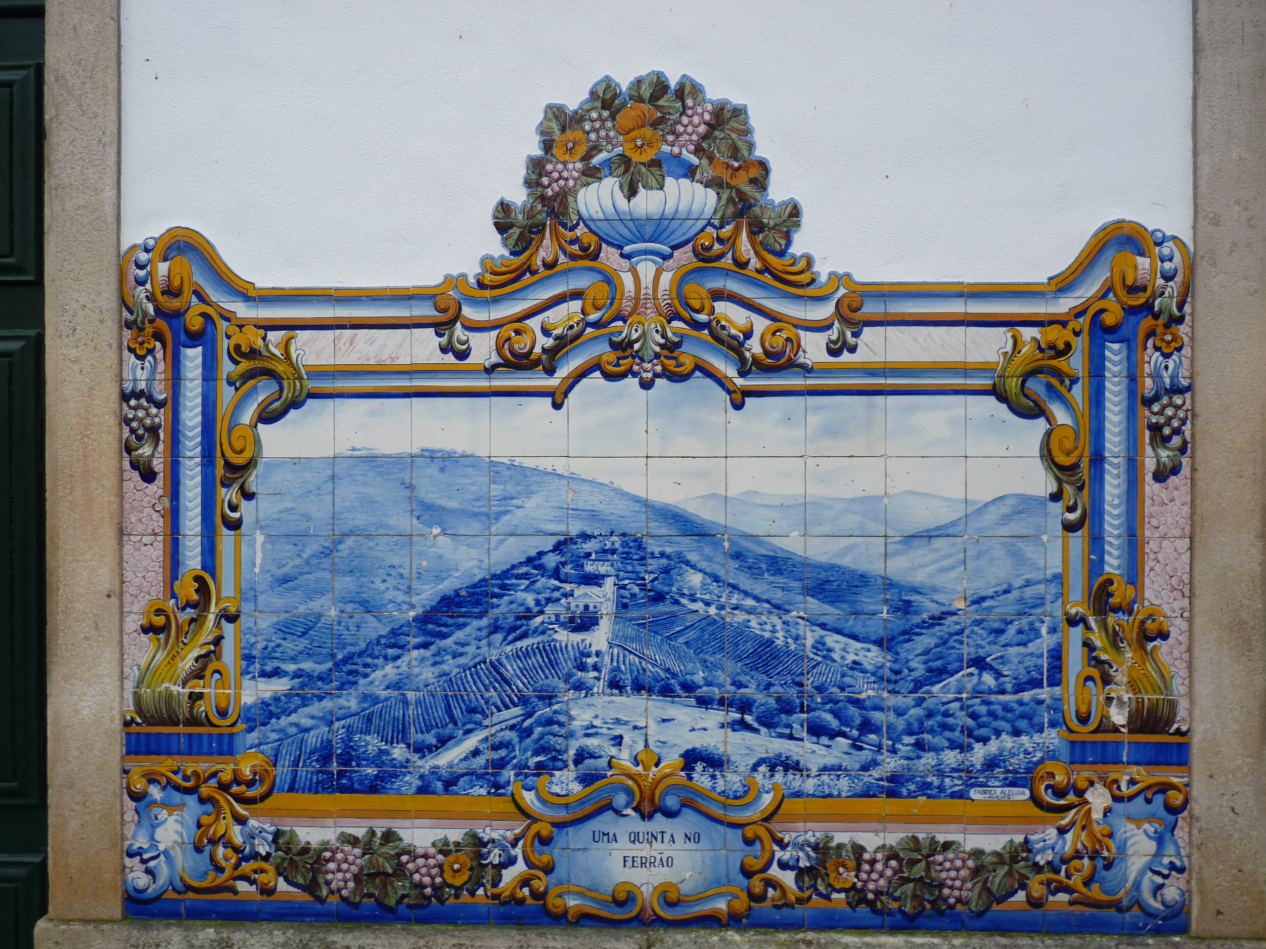 Alto Douro Vinhateiro